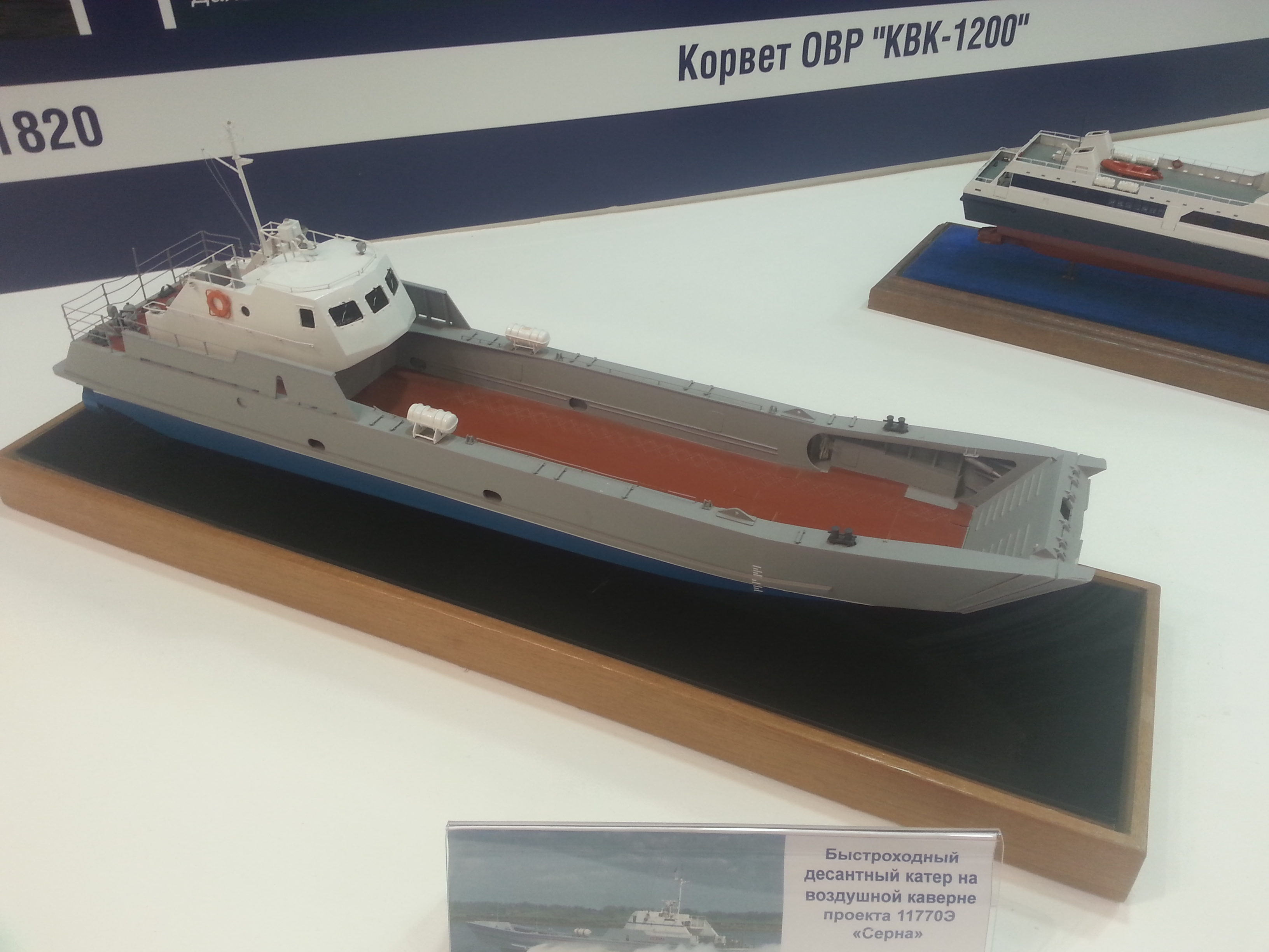 Модель десантного катера проекта 11770 «Серна» на выставке «Армия 2015»